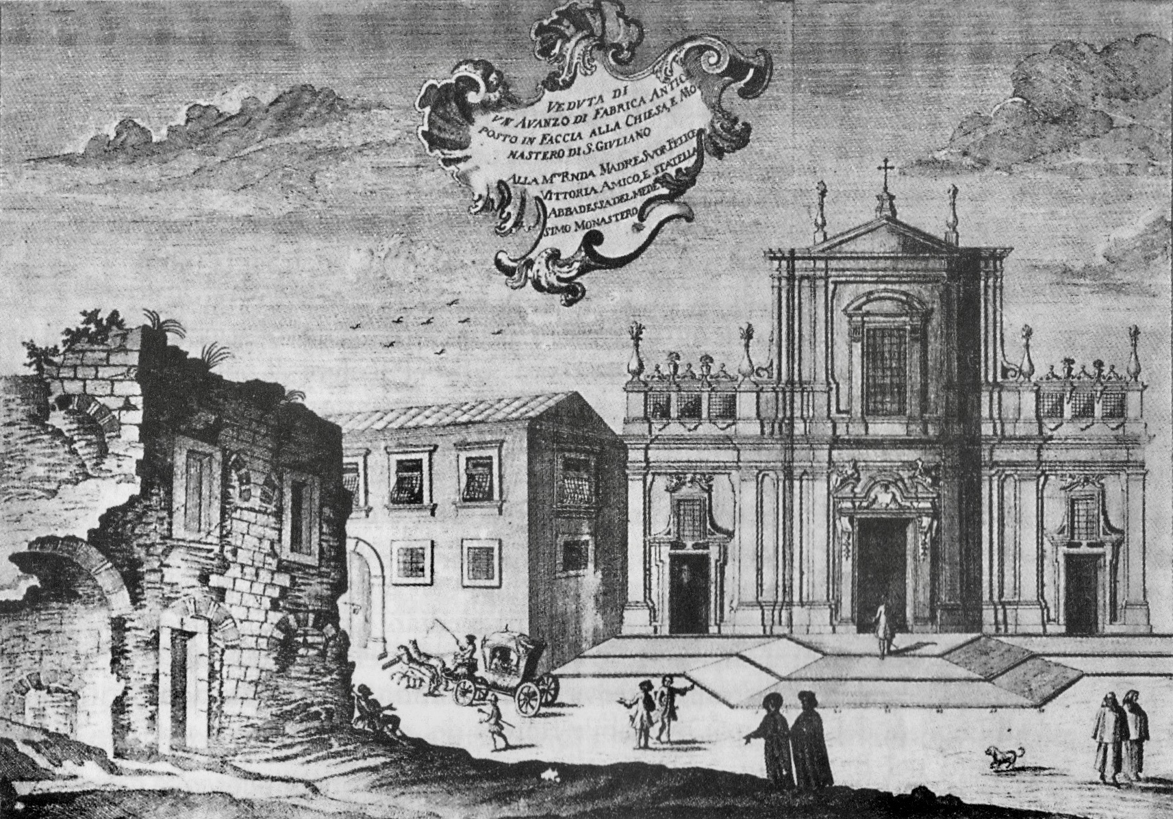 Unbekannter Künstler: Fassade der Klosterkirche San Giuliano von Giuseppe Palazzotto (1702–1764) noch ohne den Tiburio der Kirche, zugehöriges Benediktinerinnenkloster und vom Erdbeben von 1793 hinterlassene Ruine in der Via dei Crociferi, Catania.